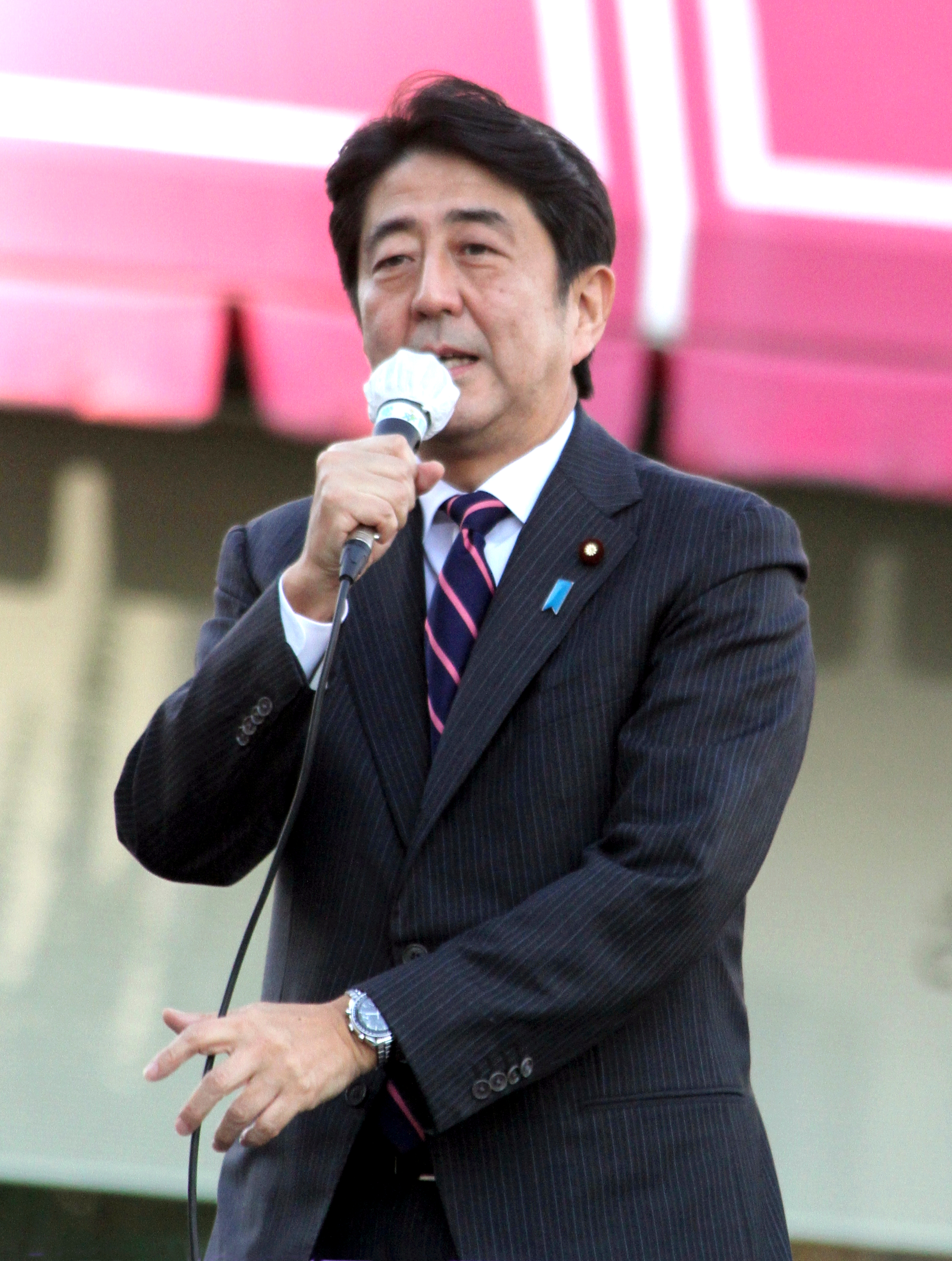 2012年自由民主党総裁選挙 街頭演説（安倍晋三）